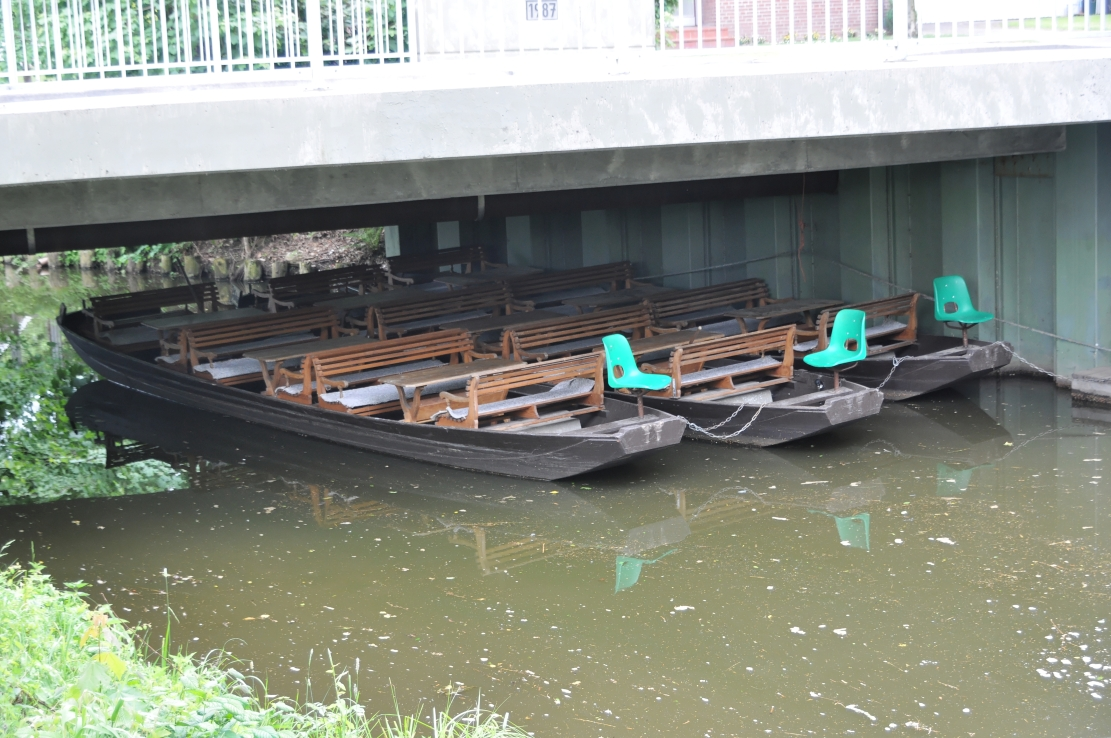 Bilder Ihlienworth 2012